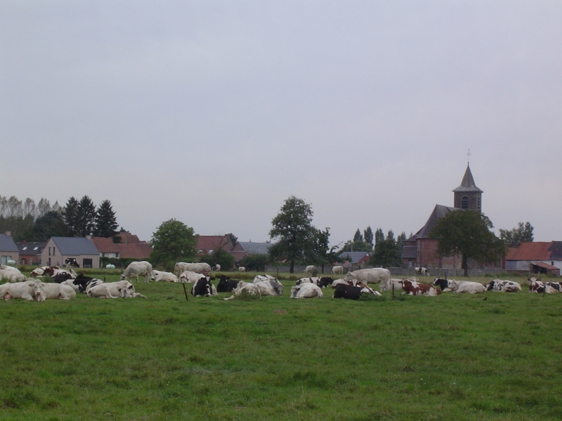 Vue sur le village de Tourpes